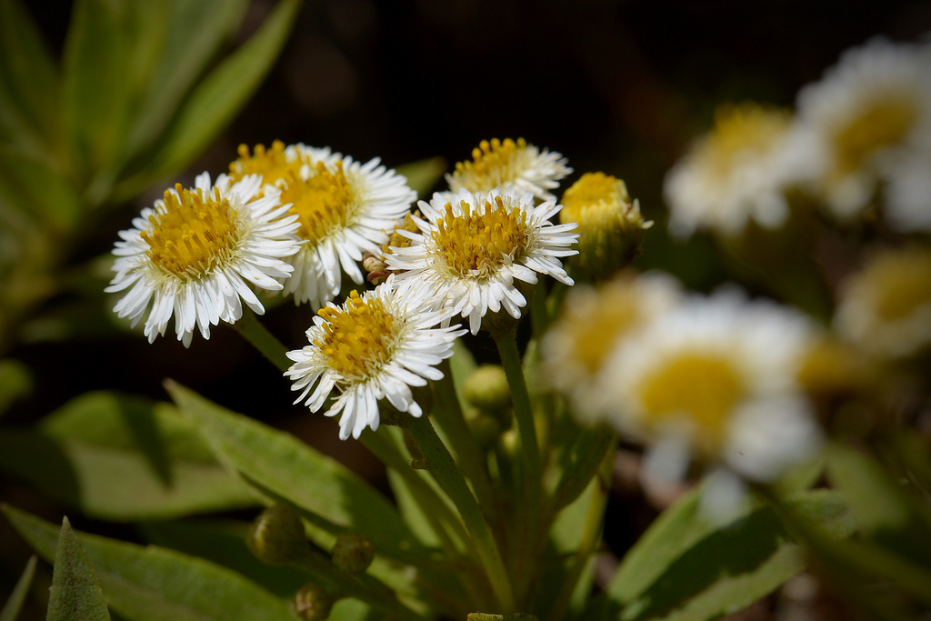 Darwiniothamnus lancifolius, flores en isla Isabela